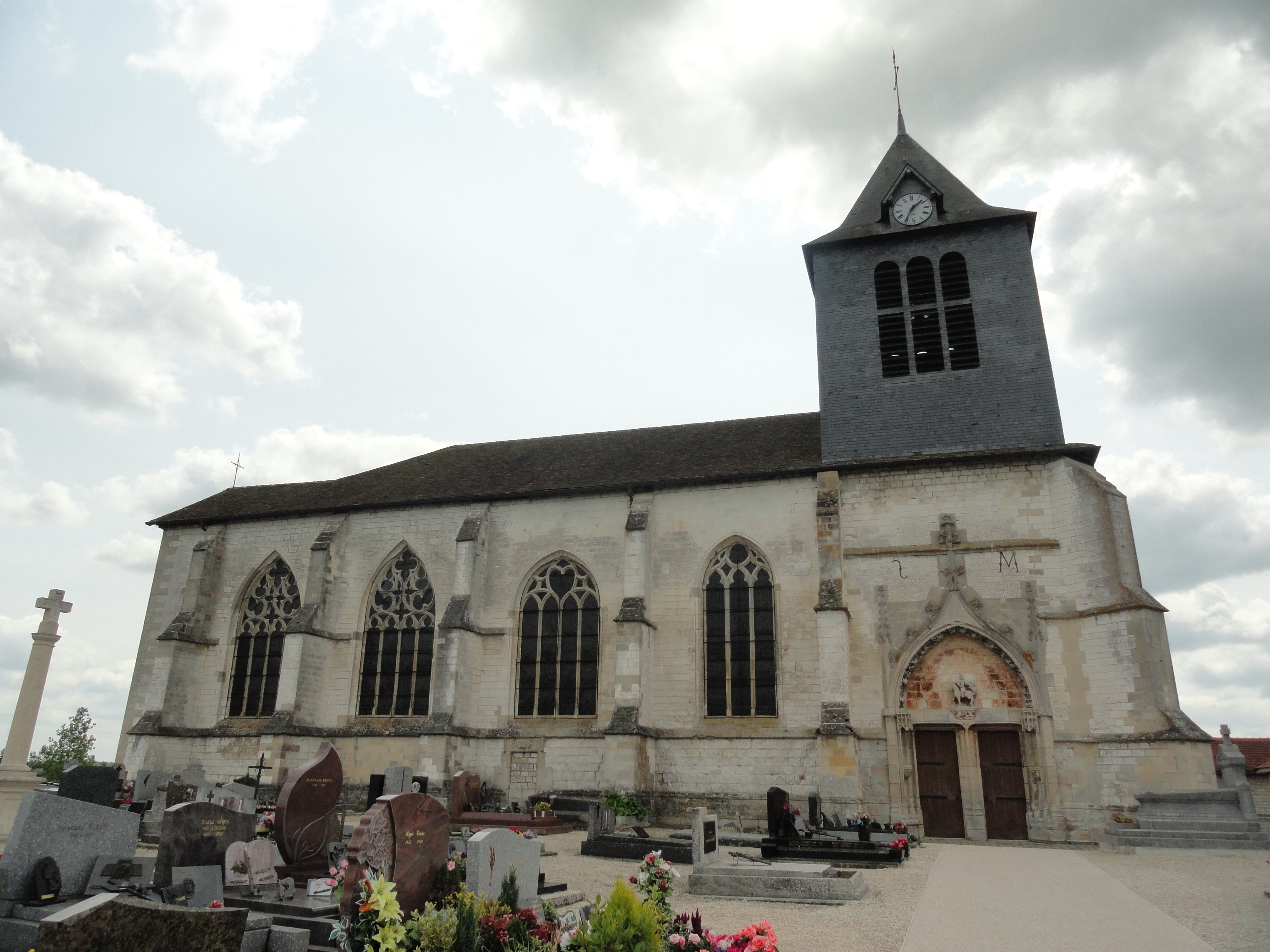 L'église Saint-Martin de Huiron (51).